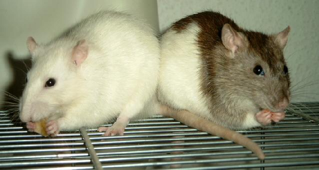 Foto unserer Farbratten (Rattus norvegicus domestica) Lady und Knuddy (v.l.) auf ihrem Käfig.